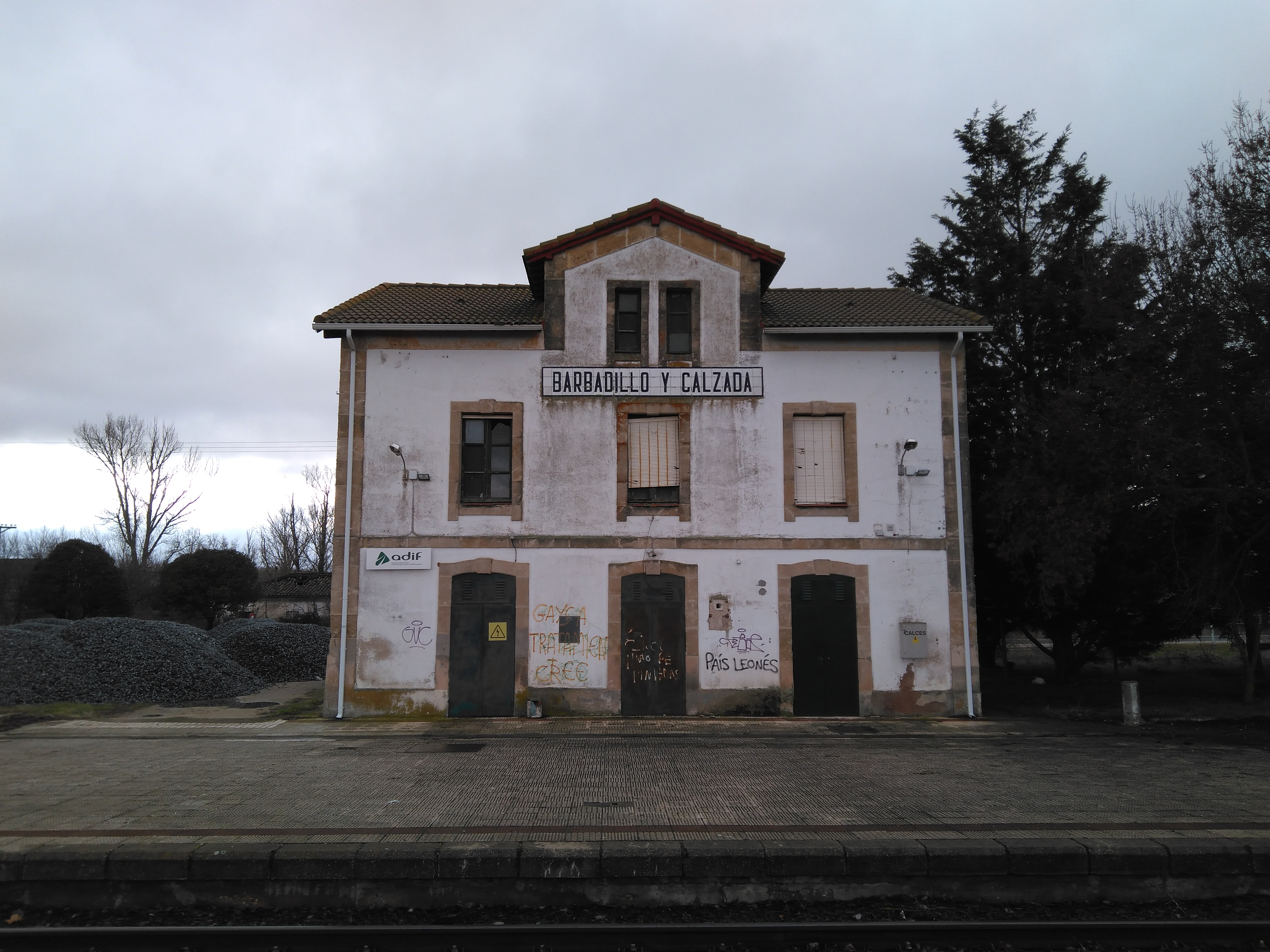 Estación de trenes de Barbadillo y Calzada.